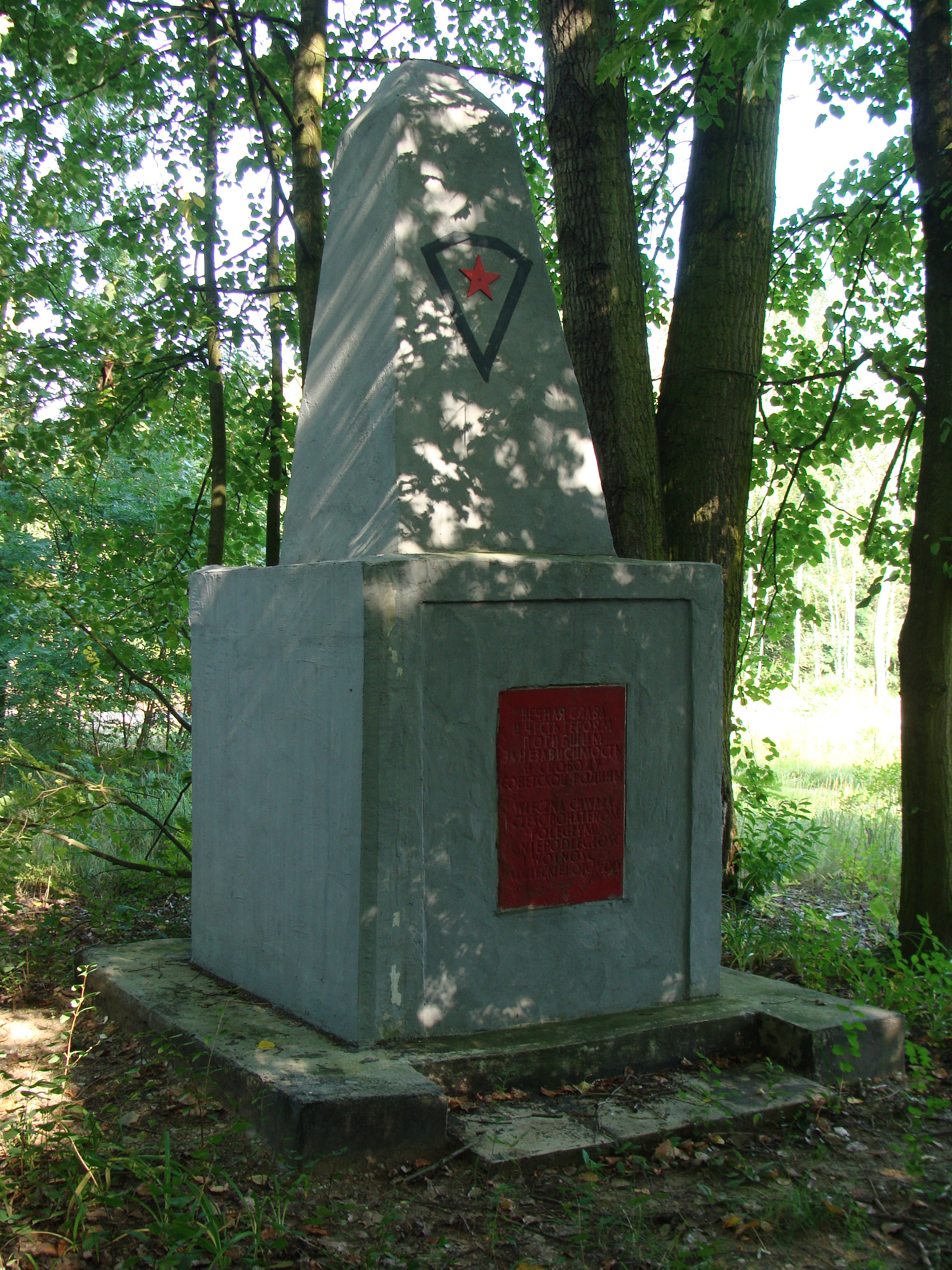 Pomnik w Dobrowie z napisem Wieczna chwała i cześć bohaterom poległym o niepodległość i wolność radzieckiej ojczyzny upamiętniający walki Armii Czerwonej, po remoncie wykonanym w 2015 r.